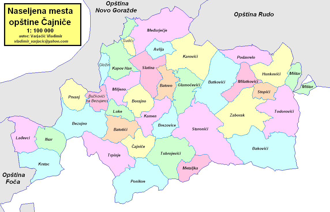 Opština Čajniče